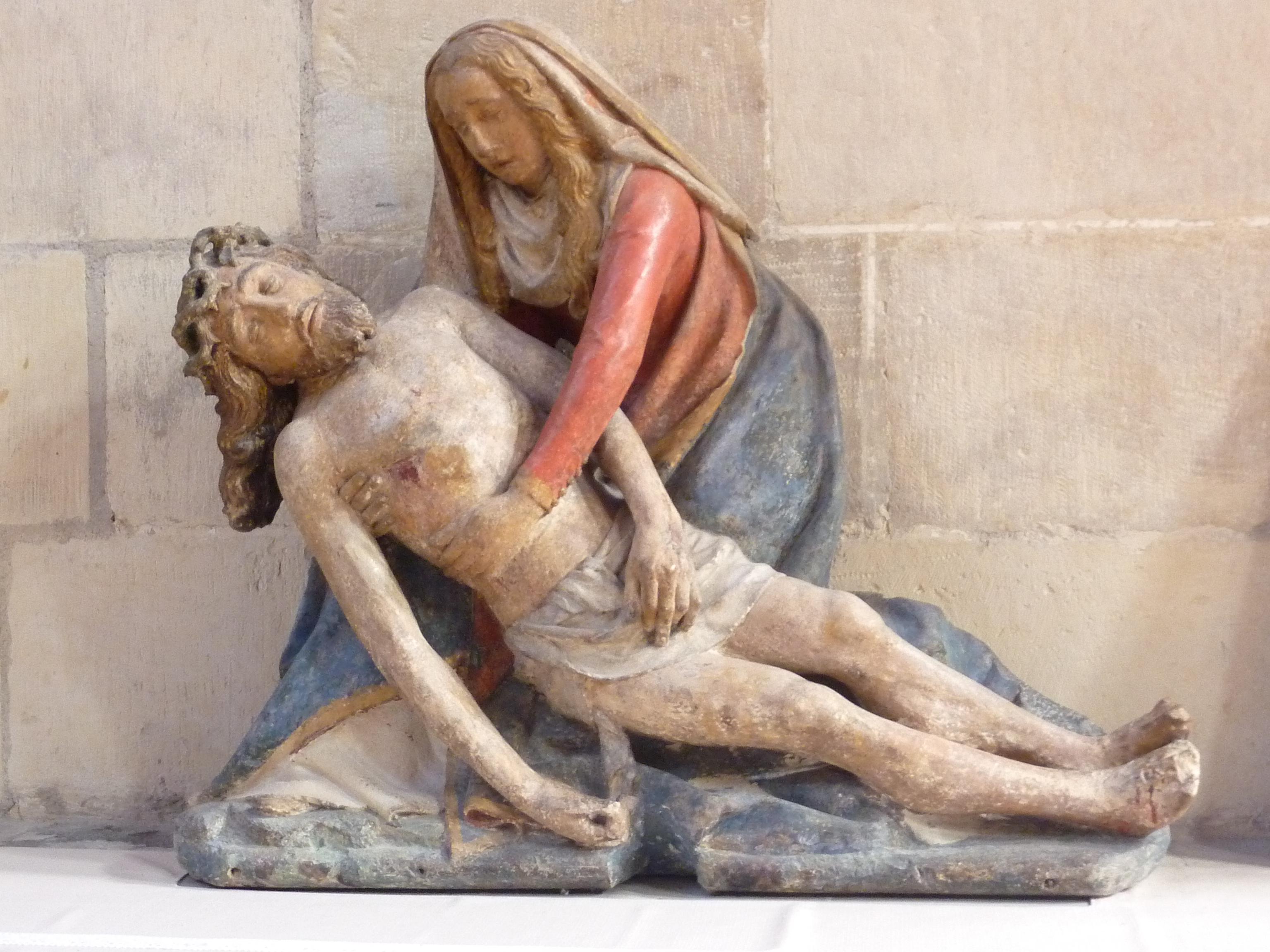 Nevers : cathédrale Saint-Cyr-et-Sainte-Julitte, Piétà